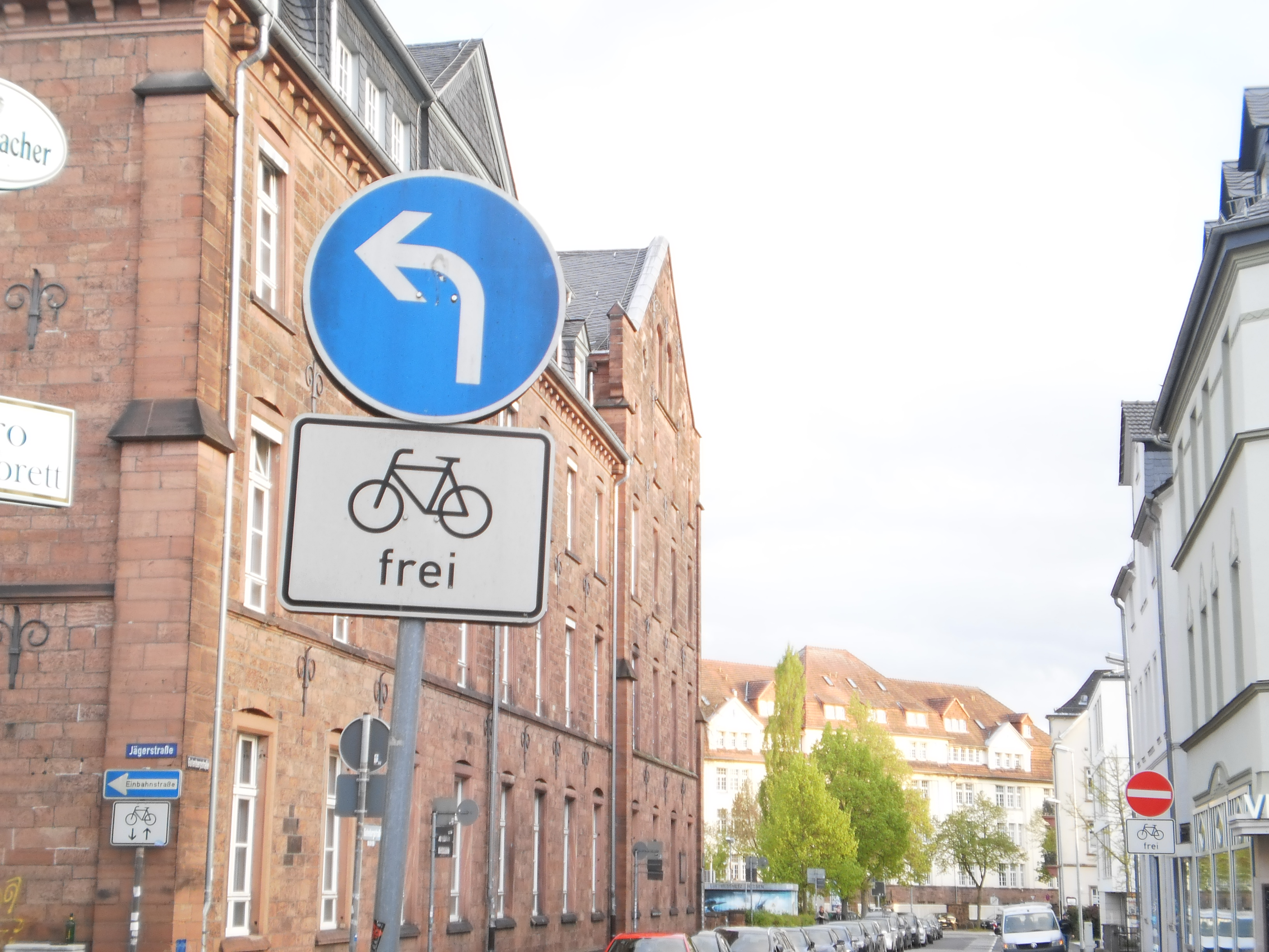 Zwei für den Radverkehr geöffnete Einbahnstrassen im Südviertel Marburgs (geradeaus die Gutenbergstraße zur nach Süden führenden Frankfurter Strasse weiter hinten, nach links die kurze Jägerstrasse als Abkürzung zur Strasse "Am Grün" und zum Hirsefeldsteg/Lahntalradweg). Auch das Abbiegegebot, also der Pfeil nach links im blauen Verkehrszeichen 209-10, ist mit Beschilderung "Radfahrer frei" freigegeben. Noch vor einigen Jahren nötige Umwege bei der Benutzung des Fahrrads sind zumindest im Zentrum Marburgs jetzt kürzer, die steilen Strassen mit Steigungen zu den höhergelegenen Wohngebieten bleiben eine Schwierigkeit für das Fahrradfahren in Marburg. Foto aufgenommen am Tag der Erde 2017.